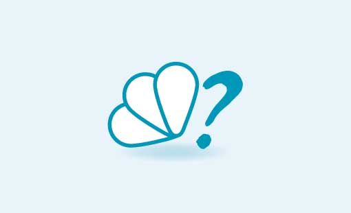 Icona de pregunta